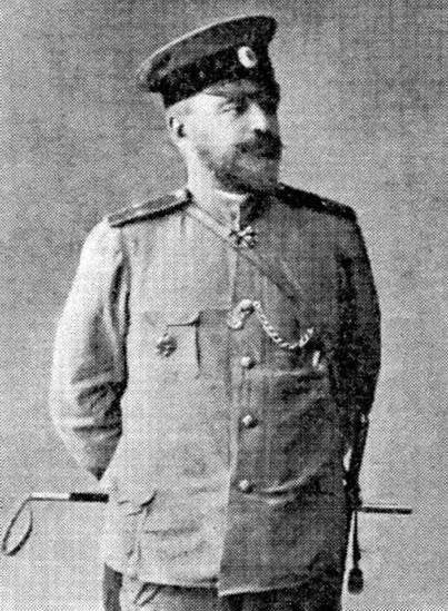 Павло Платонович Потоцький у чині інспектора артилерії (1910-14)